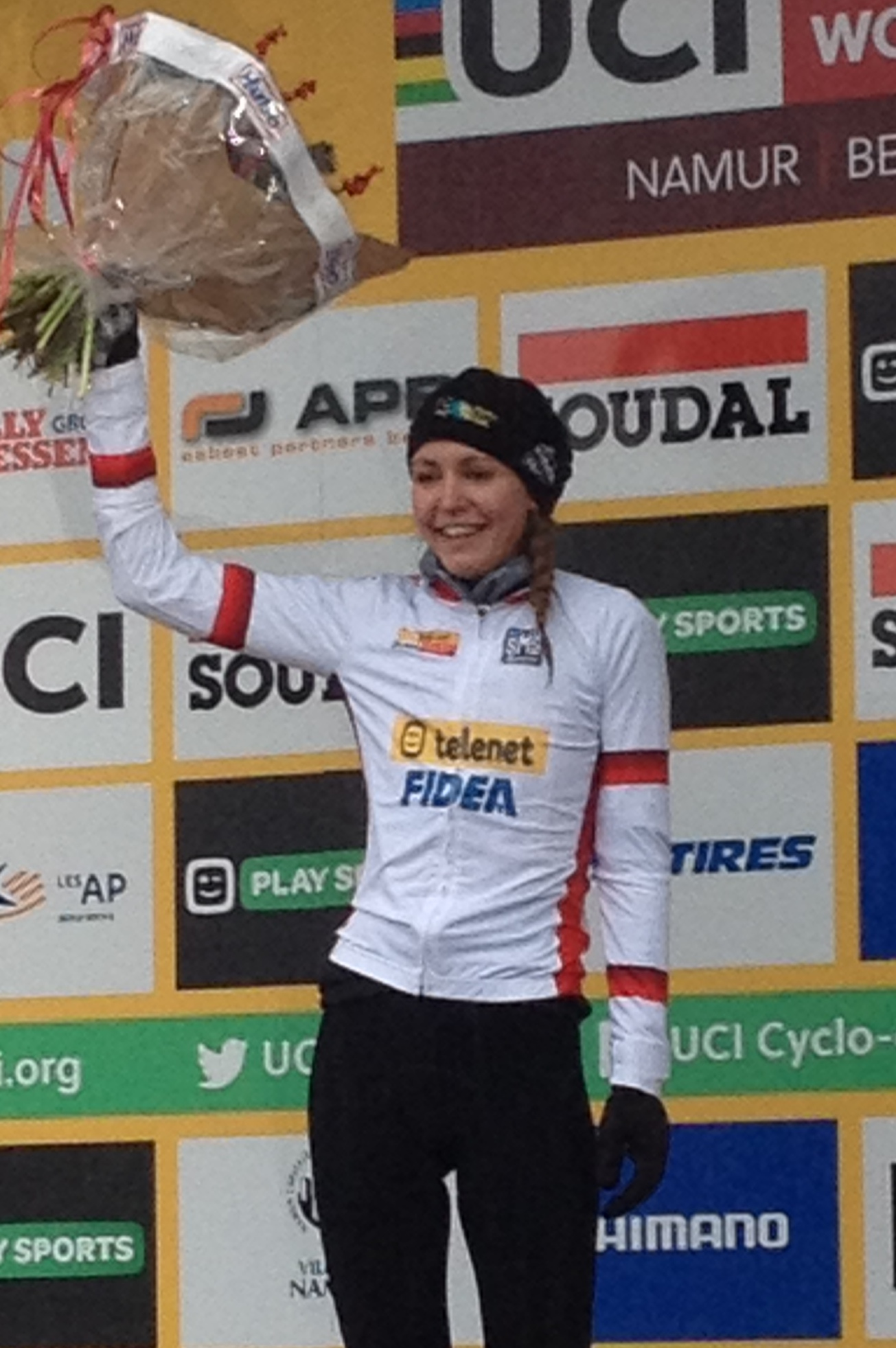 Fleur Nagengast leidster in de U23-Wereldbeker veldrijden op de Citadel van Namen op zondag 23 december 2018